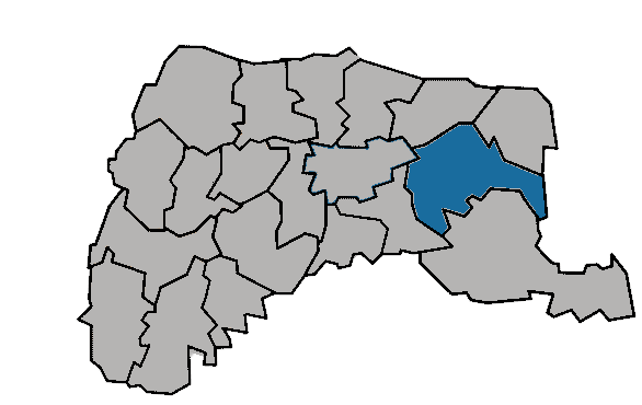 KaurJmeb為編輯臺灣省雲林縣斗六市所繪製。